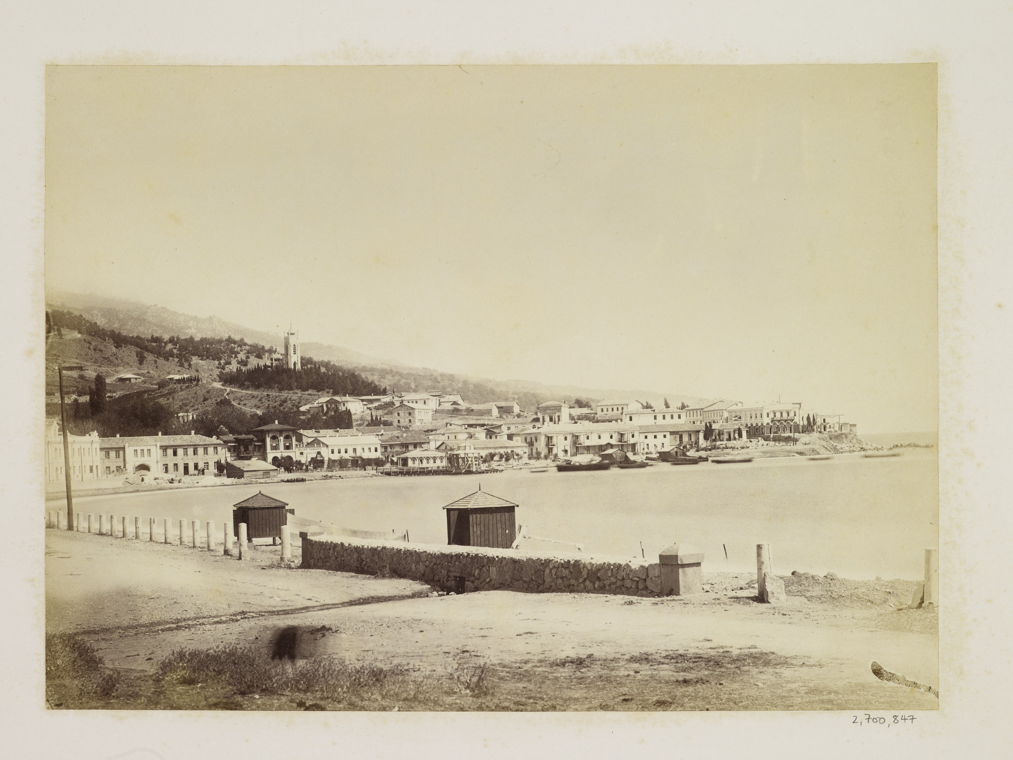 Крым